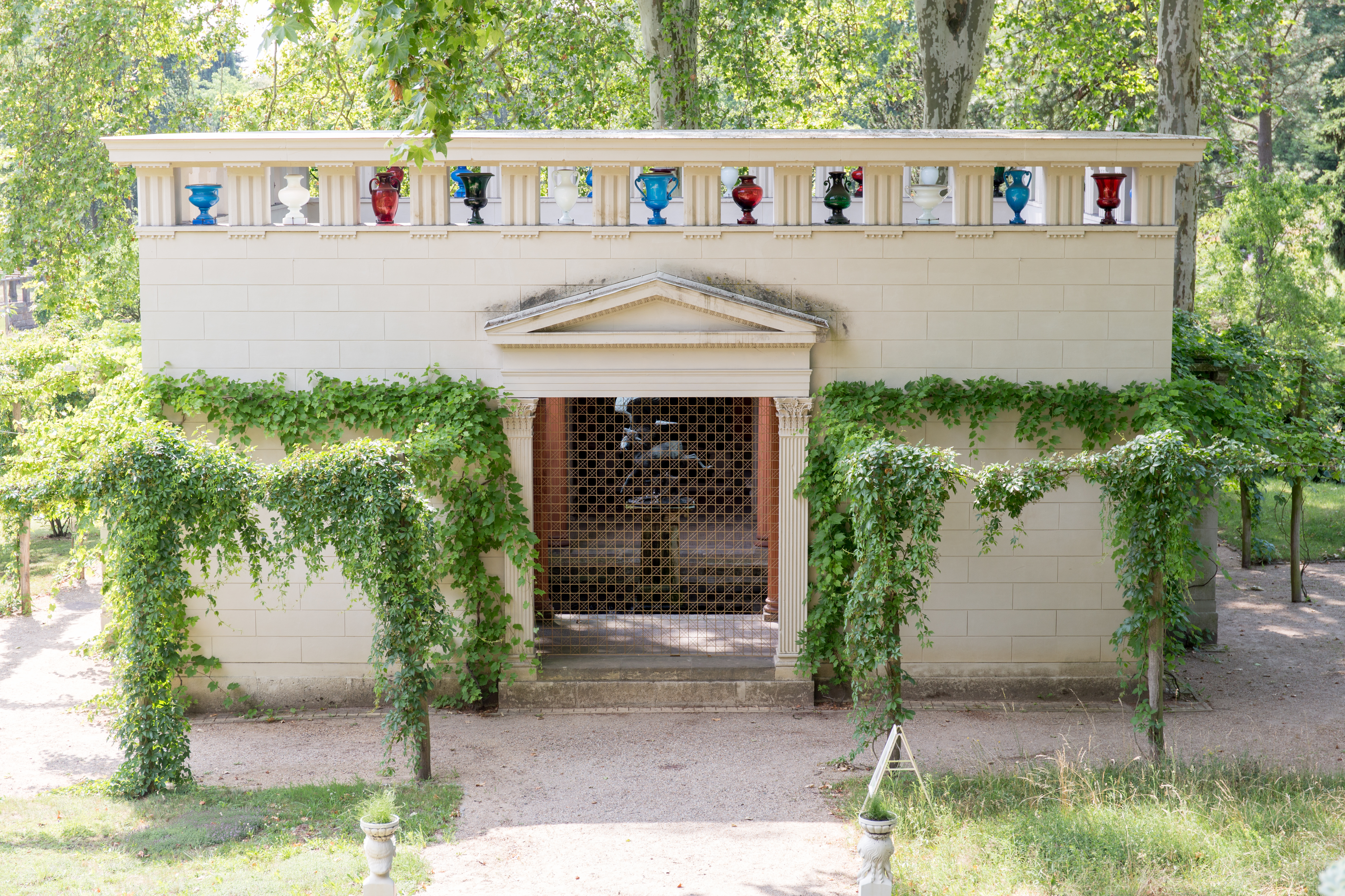 KulTour Parkanlage Sanssouci Stibadium